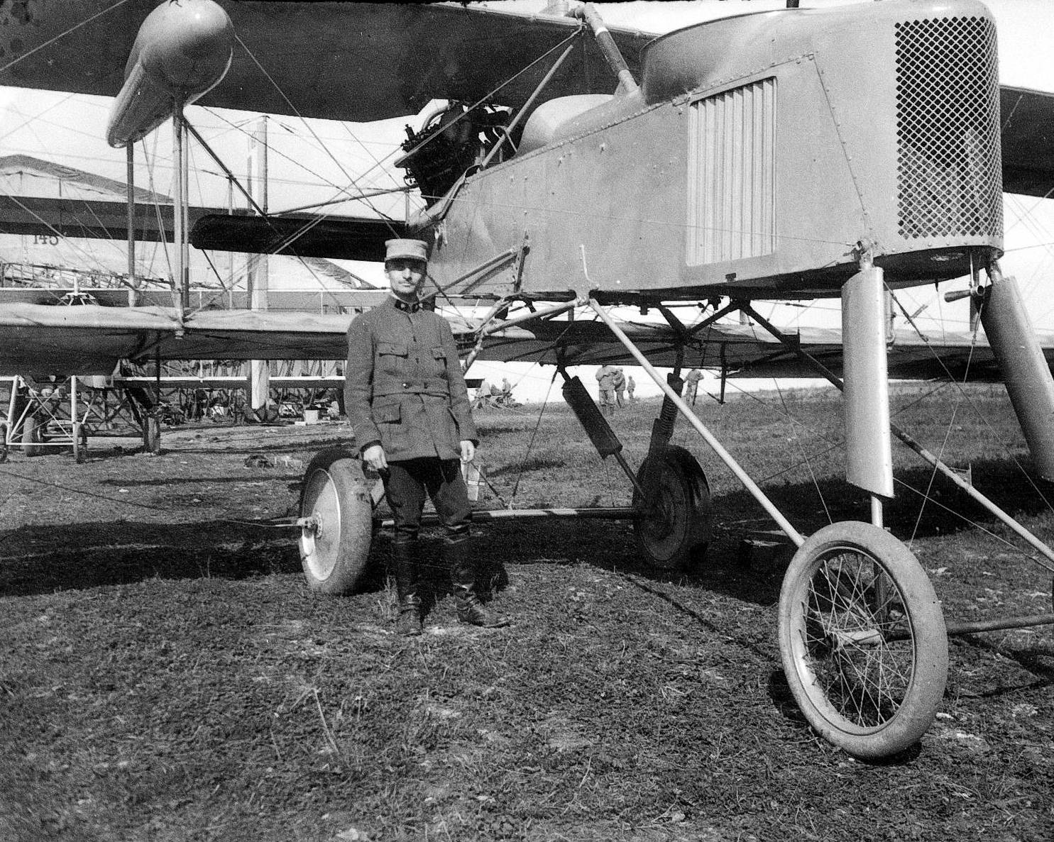 Raoul Berthelé pose devant un avion (nouveau Voisin) appartenant à l'escadrille V.114 à Fleury-sur-Aire (Meuse). 1916. Guerre 1914-1918.